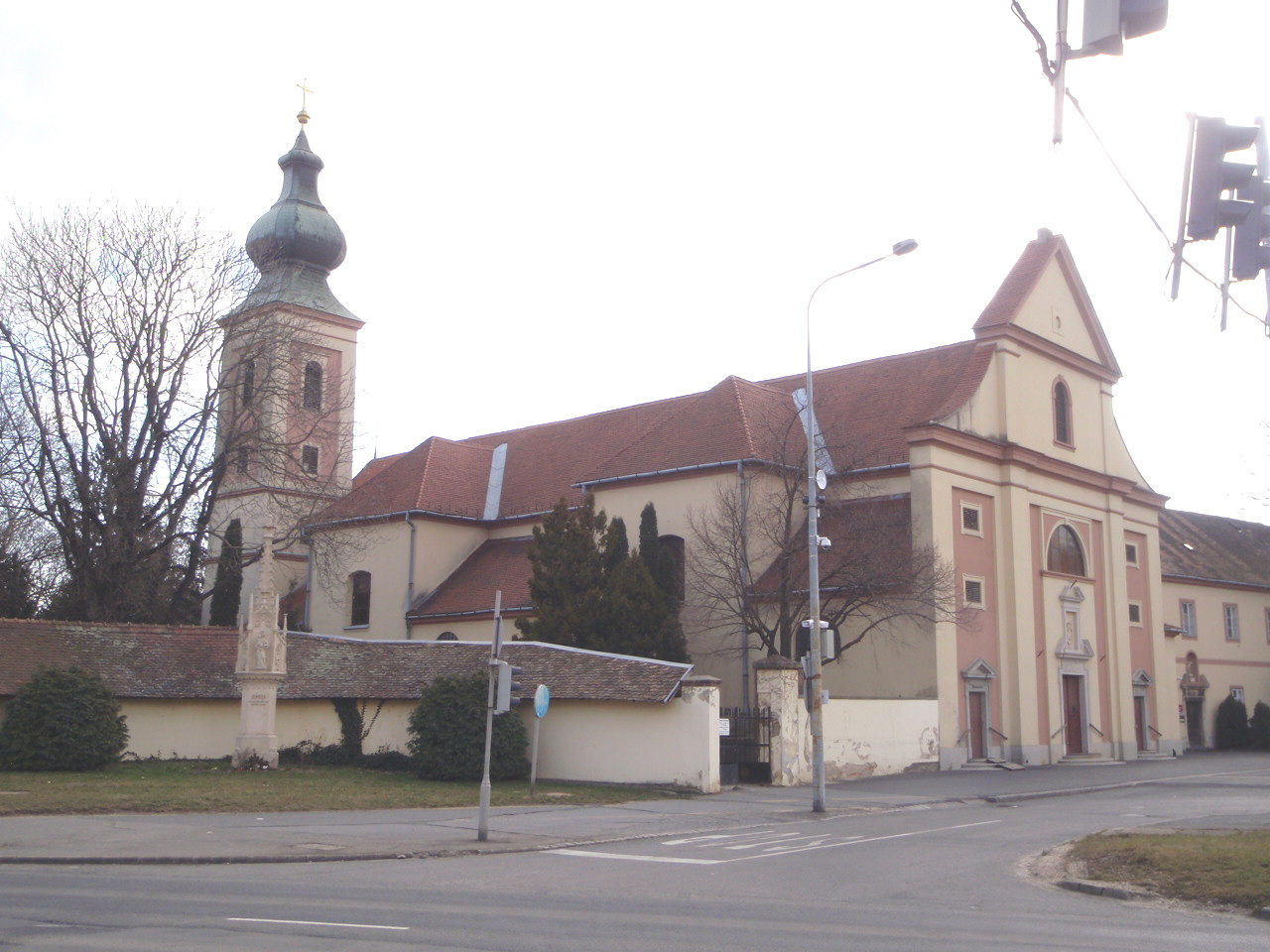 Szent Márton templom Szombathelyen